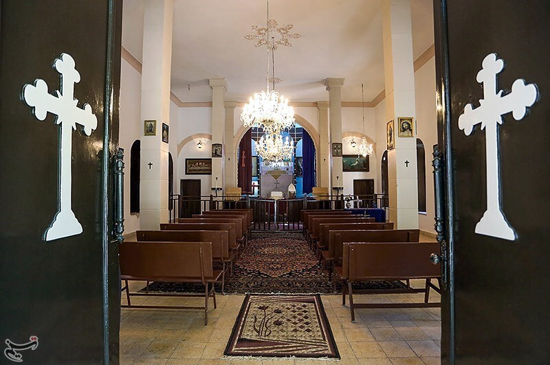 کلیسای مسروپ مقدس مشهد